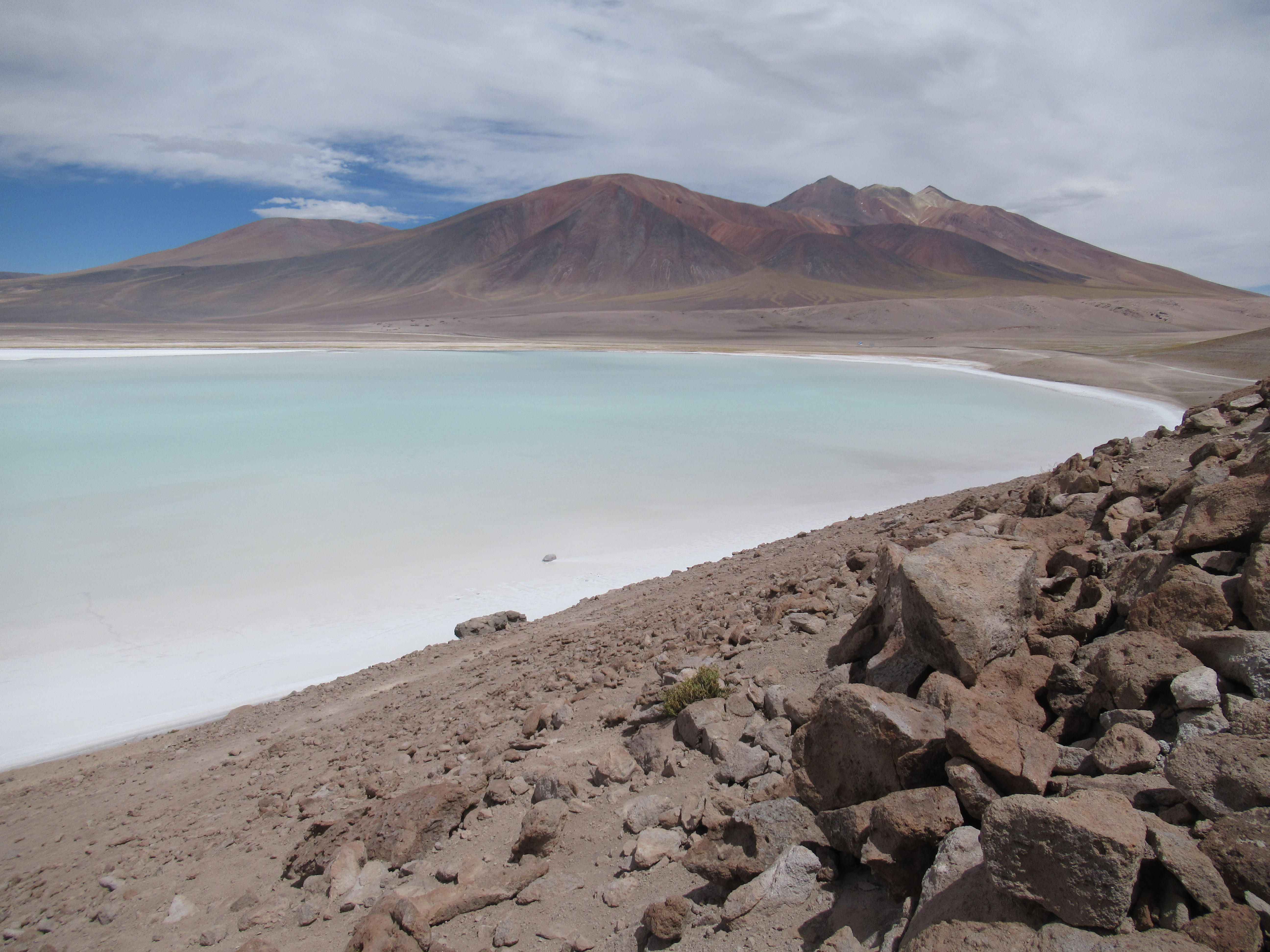 Laguna Tuyajto, 4040 m ü.M., im nordchilenischen Altiplano.